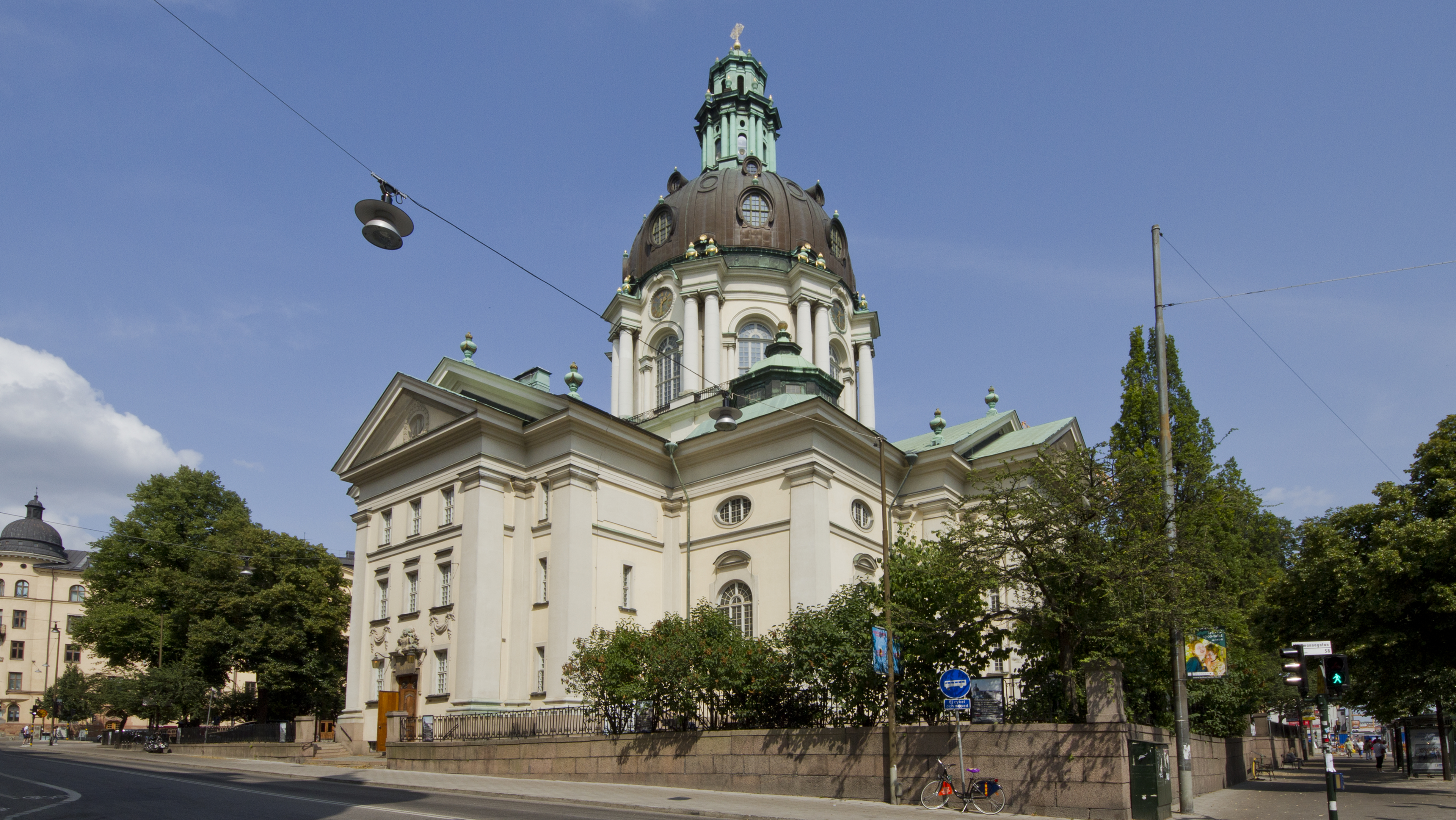 Gustav Vasa Church